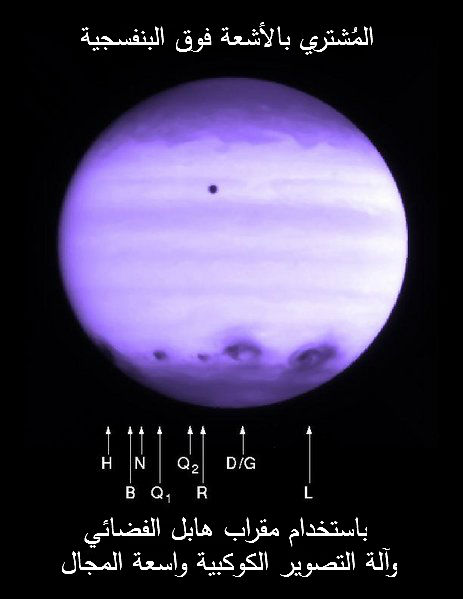 صورة فوق بنفسجية مُلتقطة بواسطة آلة التصوير الكوكبية واسعة المجال الخاصة بمقراب هابل الفضائي. تُظهر الصورة الغلاف الجوي للمشتري بطول موجيّ يصل إلى 2550 أنجسترومز بعد أن أصيب الكوكب بعدّة شظايا من المُذنّب شوميكار-ليفي 9. إن آخر الأجسام المُصطدمة هو الذي تسبب بالعلامة R الواقعة أسفل مركز المشتري (النقطة الداكنة الثالثة من اليمين). ألتُقطت الصورة في تمام الساعة 03:55 بتوقيت شرق الولايات المتحدة، يوم 21 يوليو، بعد حوالي ساعتين ونصف من الاصطدام الذي تسبب بهذه الندبة. تظهر لطخة داكنة تسبب بها اصطدام الجسم H على الجانب الصباحي (الأيسر) من الكوكب. تظهر عدّة بقع داكنة أخرى عند الاتجاه يمينًا، وهذه تسببت بها إصطدامات الأجسام Q1، R، D وG، وقد أصبحت الآن تُشكل بقعة واحدة ضخمة، بالإضافة للبقة التي تسبب بها الجسم L، وهي أكبر البقع حتى الوقت الحالي. يُمكن للمدقق بالصورة أن يُلاحظ البُقع الصغيرة التالية: B، N، وQ2. تظهر جميع هذه البقع داكنة جدًا بالأشعة فوق البنفسجية بسبب وجود كمية عظيمة من الغبار في غلاف المشتري، وهذا كما هو معروف، ، يمتص أشعة الشمس.